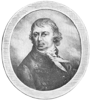 Беларуская (тарашкевіца): Францішак Карпінскі